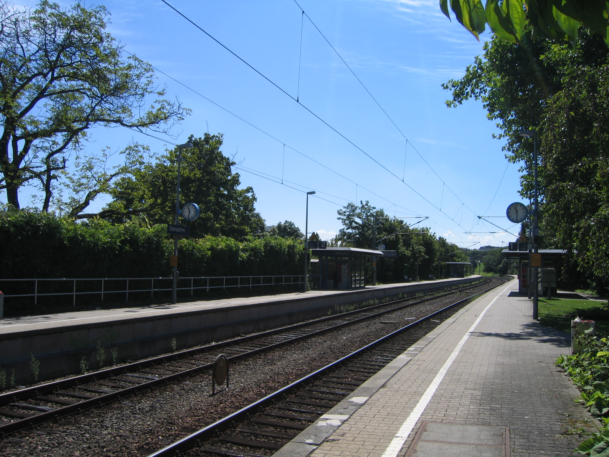 Haltepunkt Oberaichen